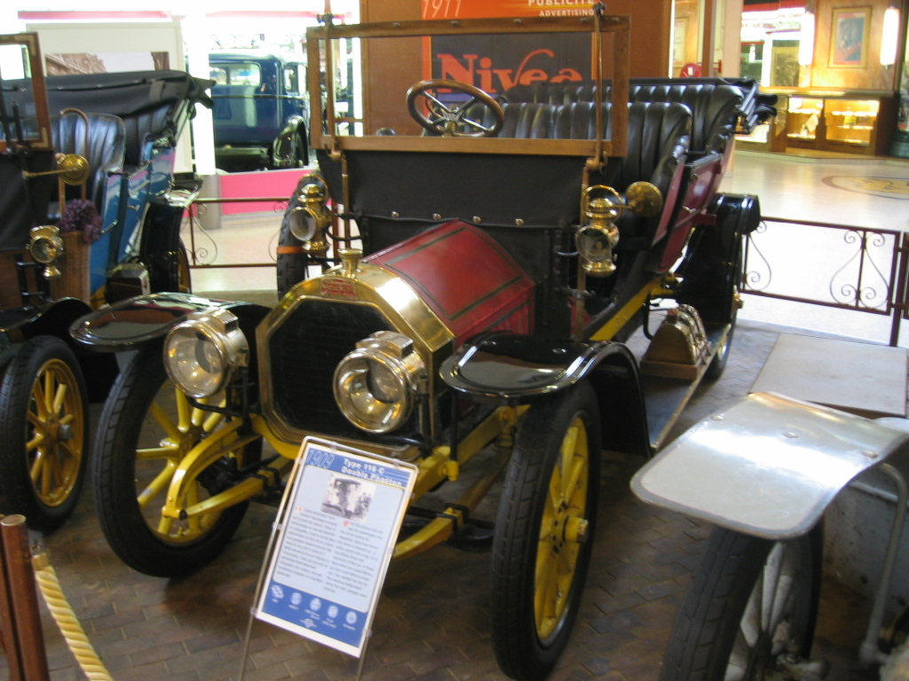 Peugeot Type 116 - Musée Peugeot Sochaux